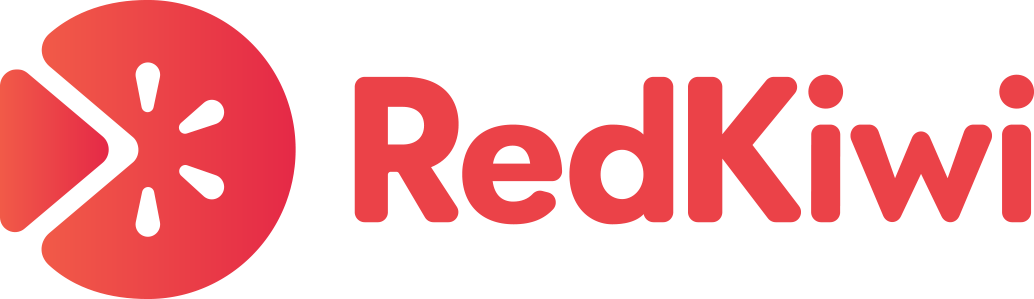 레드키위 애플리케이션의 로고